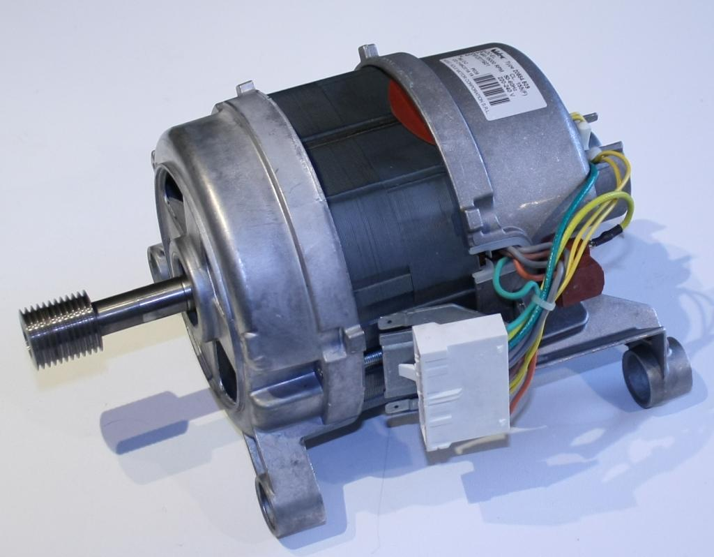 Elektromotor einer modernen Waschmaschine